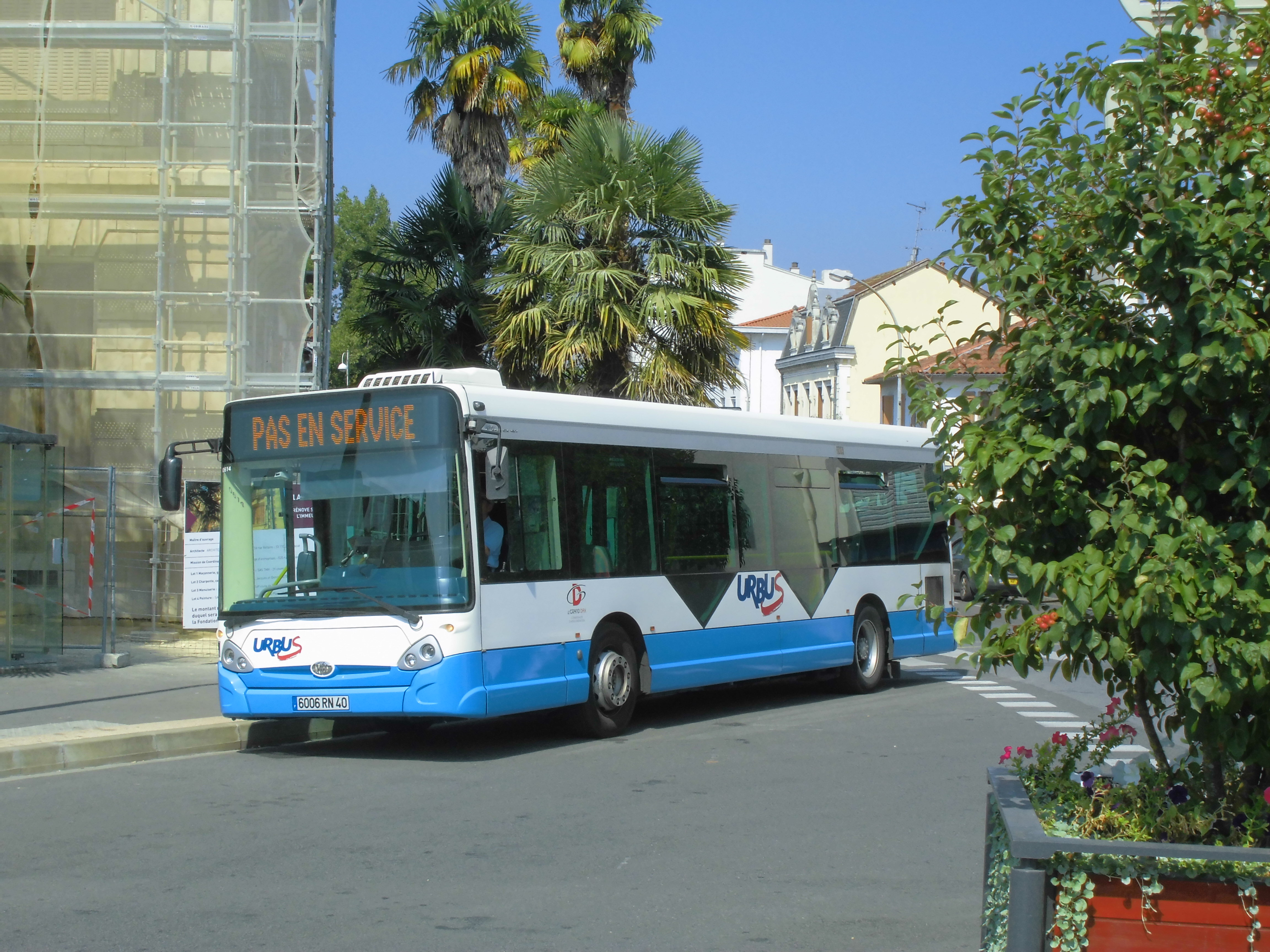 HeuliezBus GX127 en attente de mise en service commercial Place Saint-Pierre à Dax.